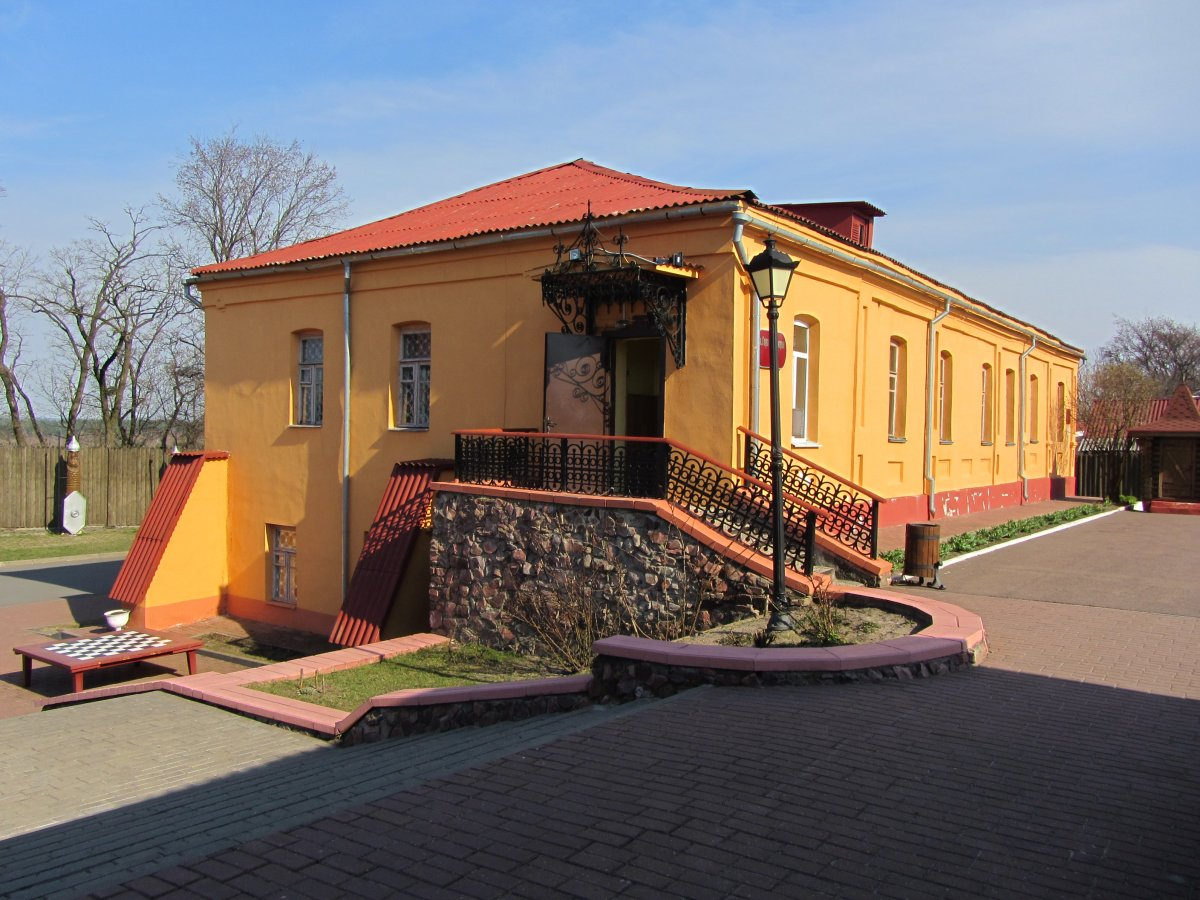 Мазыр. Забудова Замкавай гары